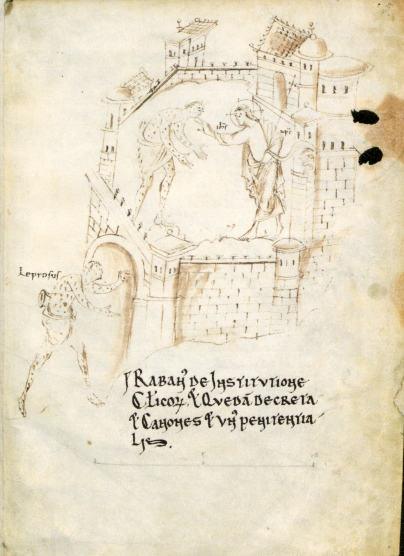 fol. 5v. Universitäts und Landesbibliothek B113: "Jesus heilt einen Aussätzigen"